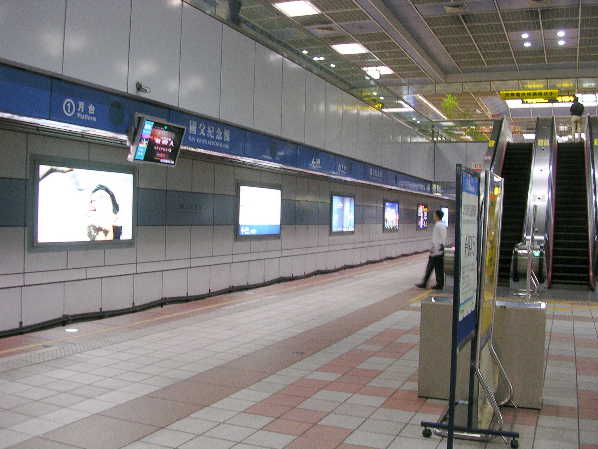 中文（台灣）: 臺北捷運國父紀念館站第一月台。